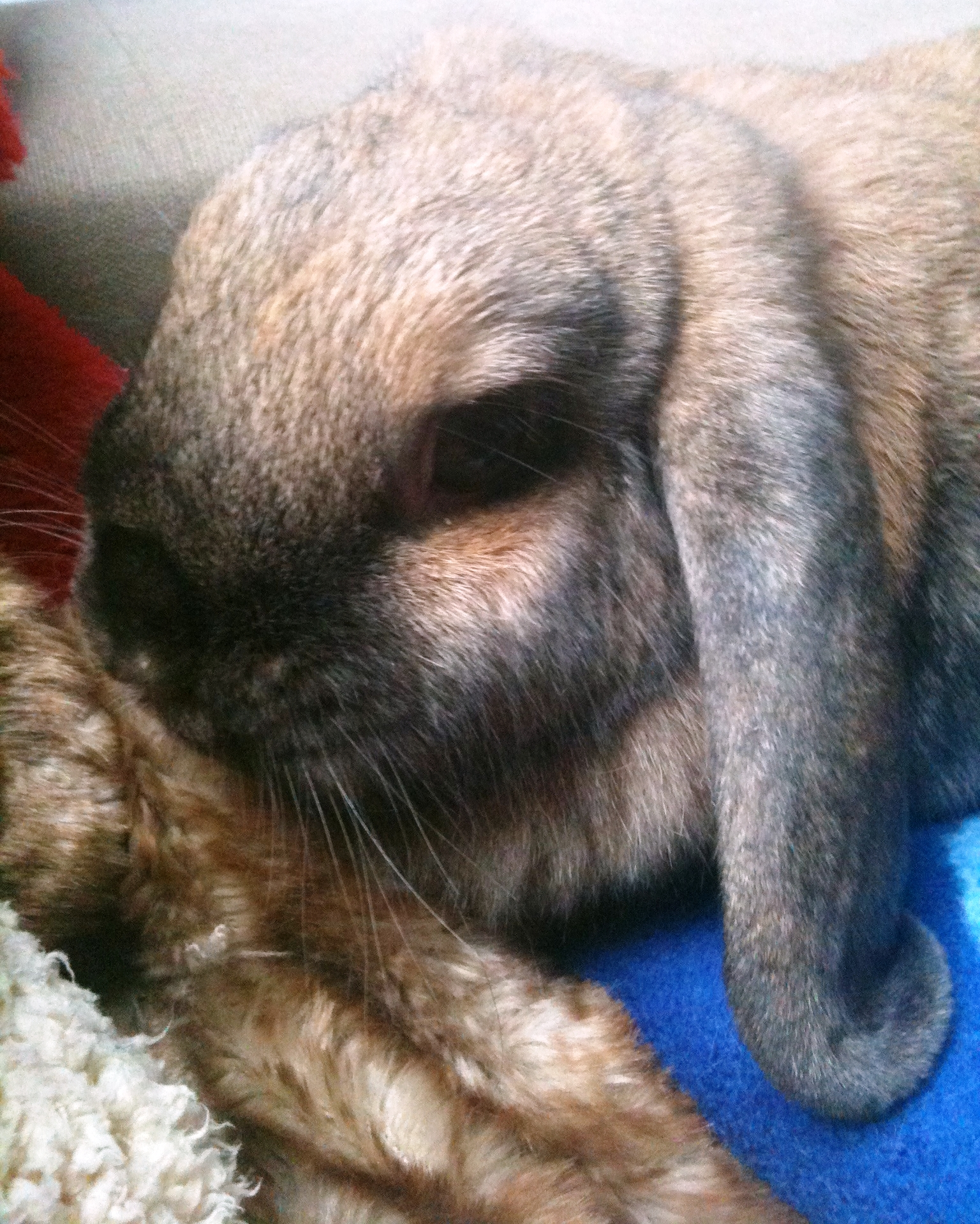 Thüringerfarbener Zwergwidder